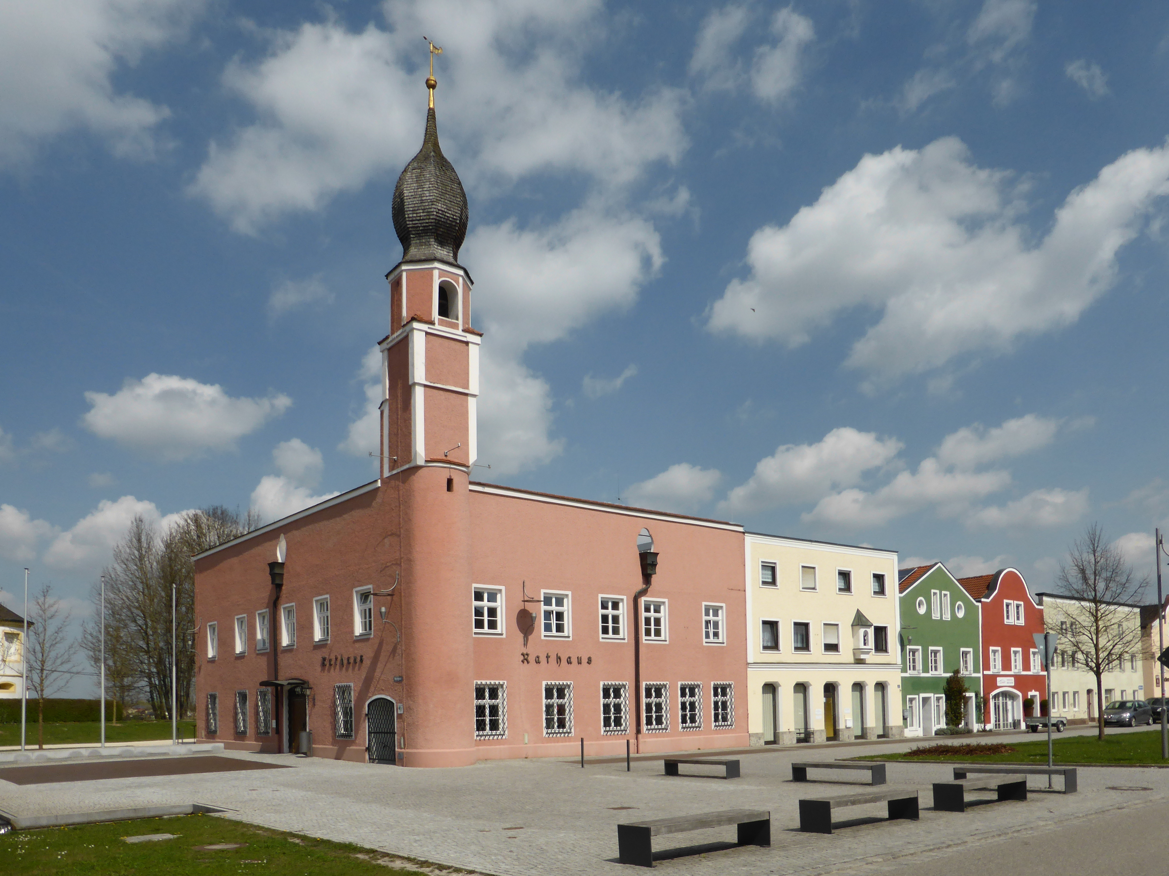 Markt Tüßling, Rathaus am Marktplatz.